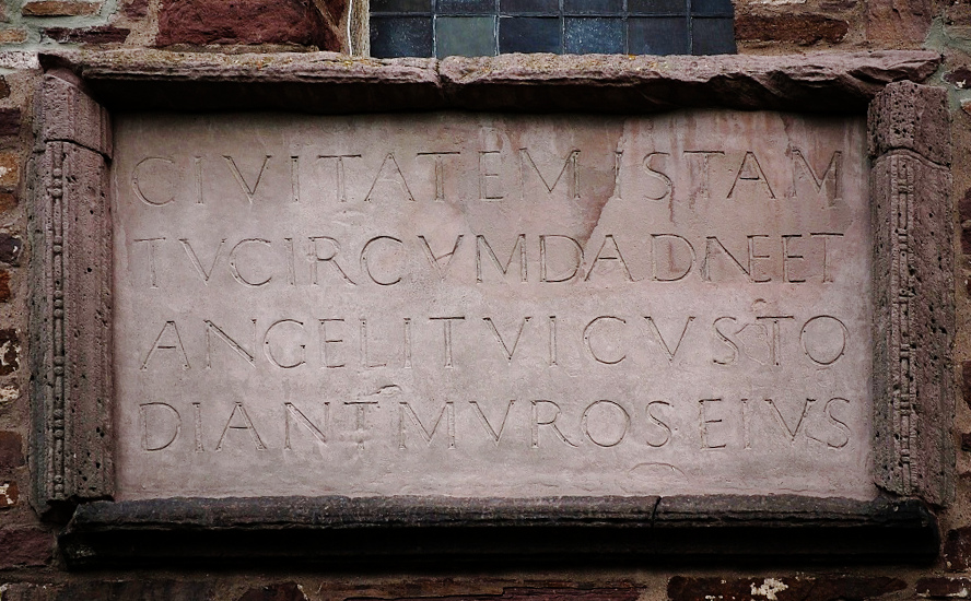 Bauinschrift am Westwerk der Klosterkirche Corvey. Sie lautet: CIVITATEM ISTAM TV CIRCVMDA DNE ET ANGELI TVI CVSTODIANT MVROS EIVS (Herr, umgib diese Stadt und lass deine Engel Wächter ihrer Mauern sein).